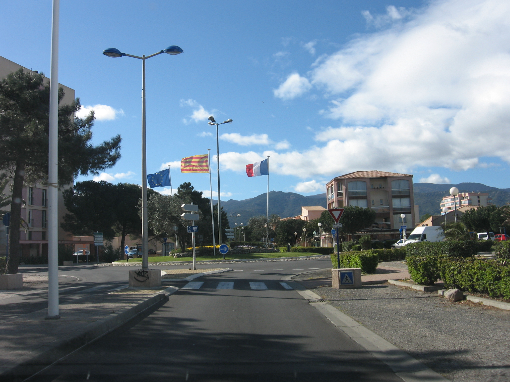 Argelès-sur-Mer